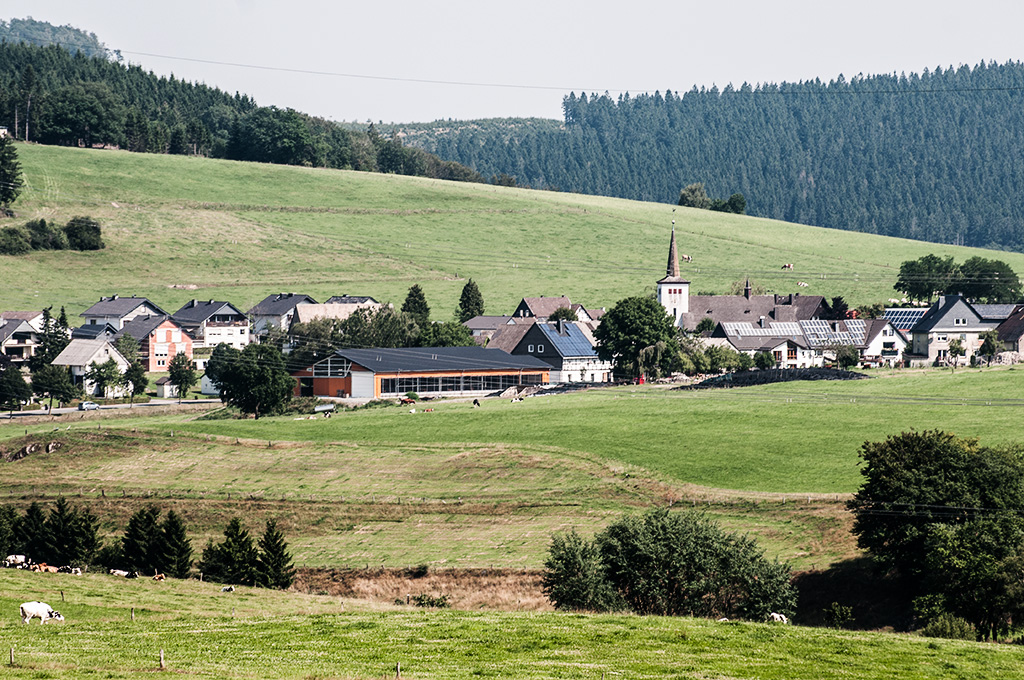 Meinkenbracht, Ortsteil von Sundern/Sauerland; Ansicht von Süden